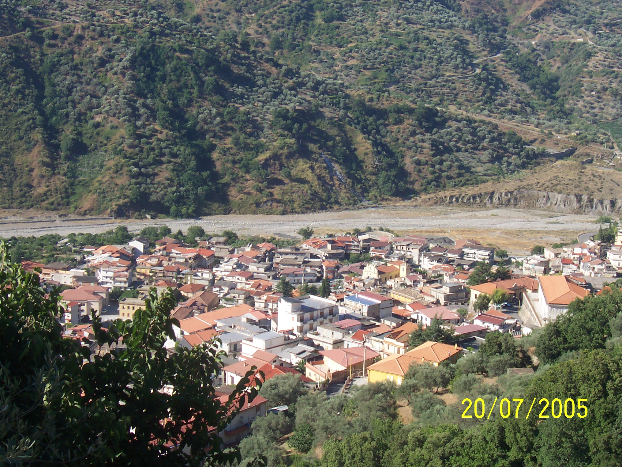 Concedo la foto fatta da me a Wikipedia in GDFL